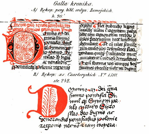 Początek Kroniki Galla Anonima z rękopisu Zamoyskich